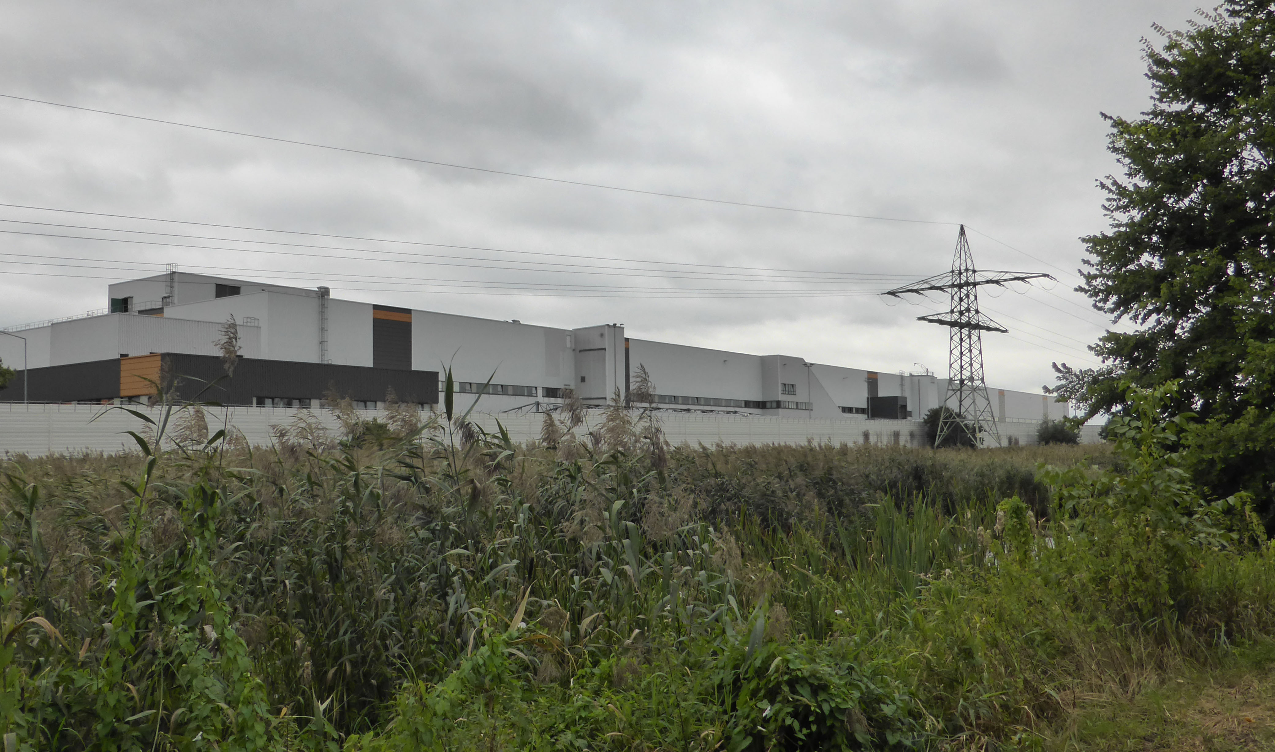 Teilansicht des Volkswagenwerkes Wolfsburg, von Kästiorf aus gesehen